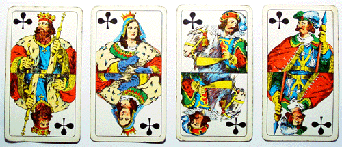 Cego Kartenspiel: 4 ausgewählte Bild Karten